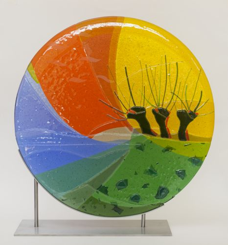 Trofee, kunstwerk door Angenelle Thijssen.